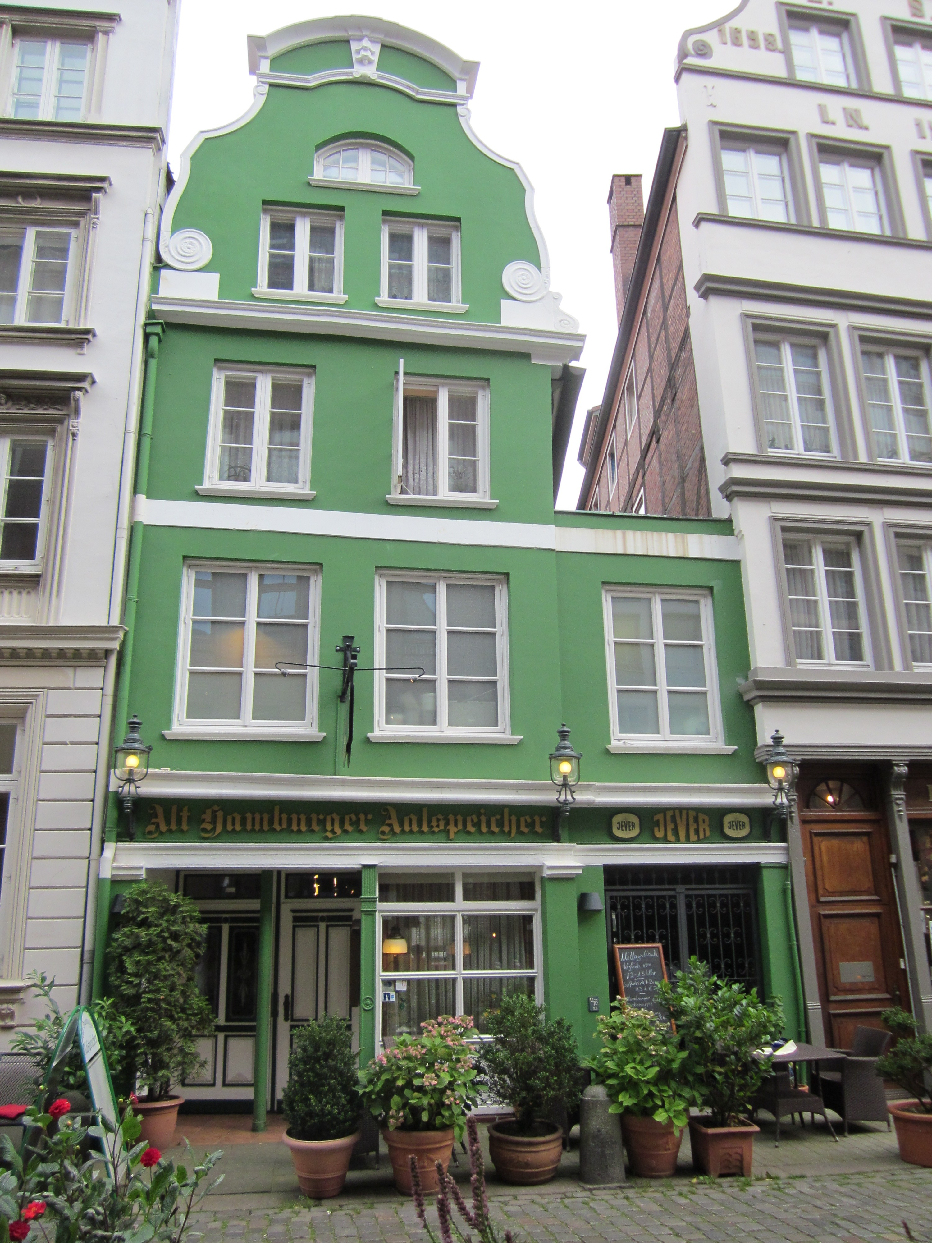 Das barocke Haus Deichstraße 43 in der Hamburger Altstadt wurde 1697 errichtet und nach Teilzerstörung im Zweiten Weltkrieg 1974 saniert. Dabei wurde auch der Volutengiebel wieder hergestellt. This is a photograph of an architectural monument.